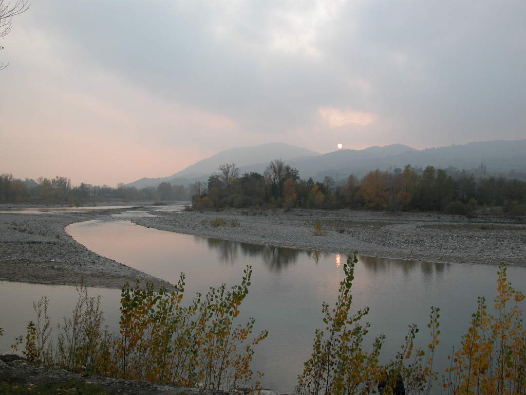 Il fiume Trebbia a Rivergaro, 2007